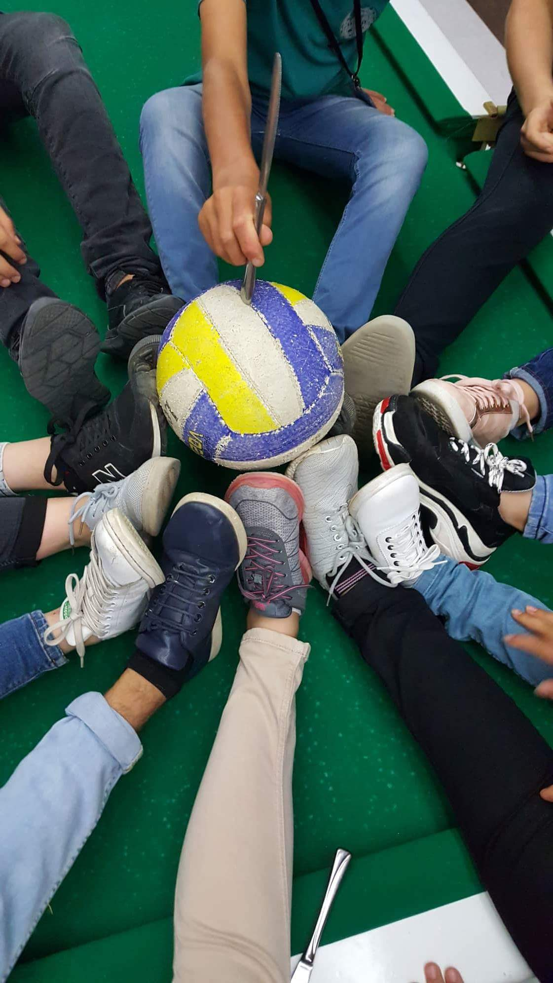 Վիքիճամբար